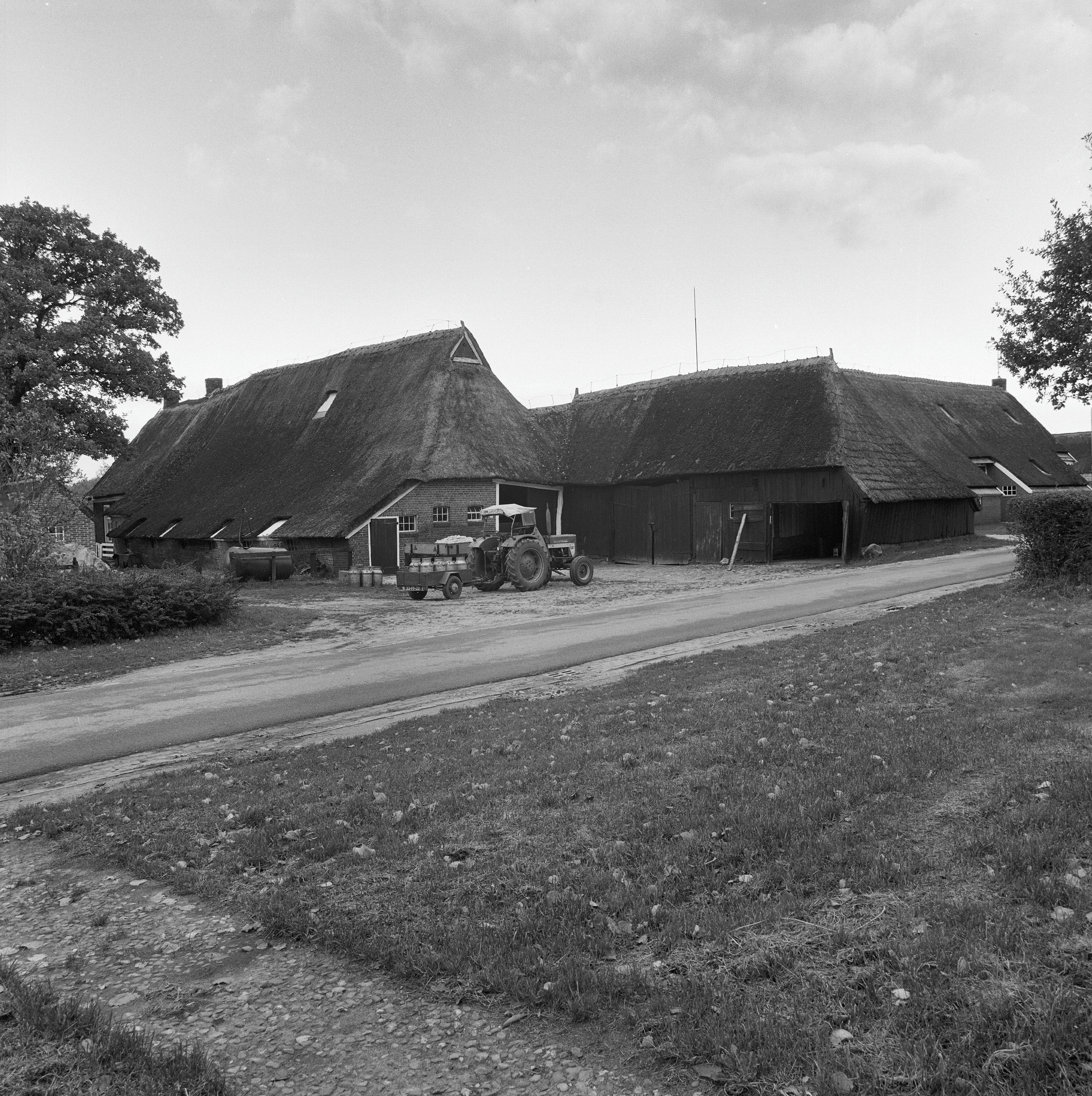 overzicht achterzijde